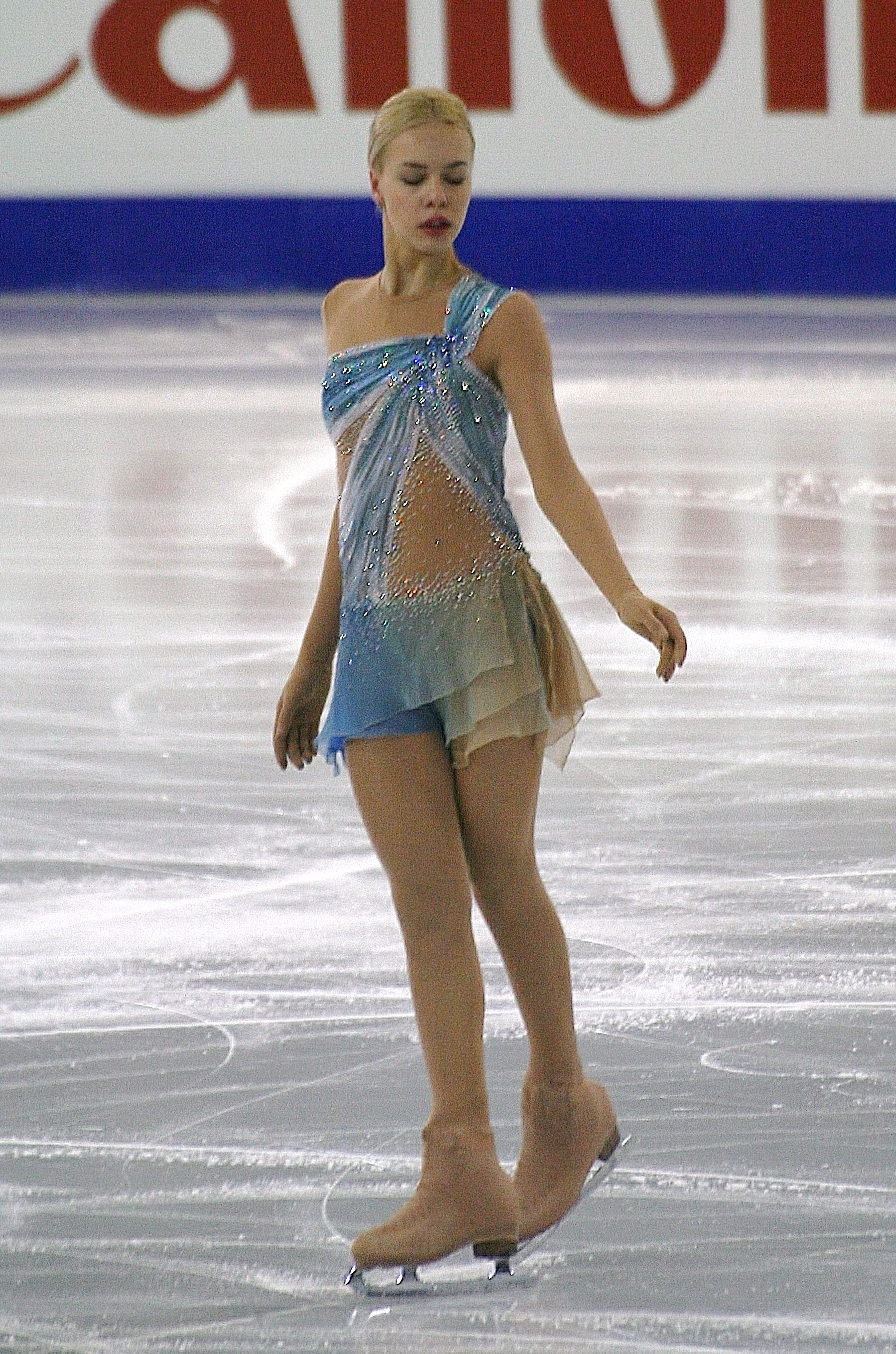 Анна Погорилая (Россия) на финале Гран-при по фигурному катанию 2014-2015.